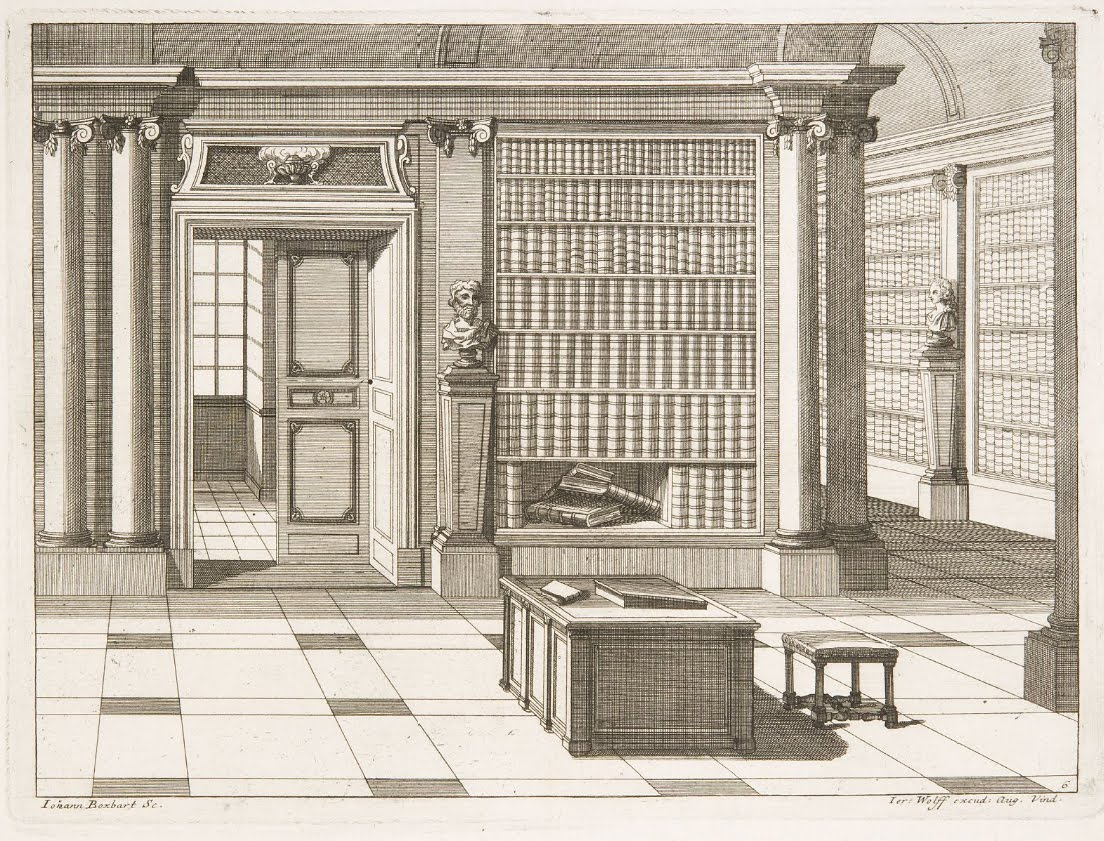 Bibliothek, aus der Serie Baulichkeiten; Kupferstich, Platte: 226 x 305; Blatt: 301 x 366; Herzog-Anton-Ulrich-Museum, Sig. JBoxbarth AB 3.6, Inv. Nr. 2643